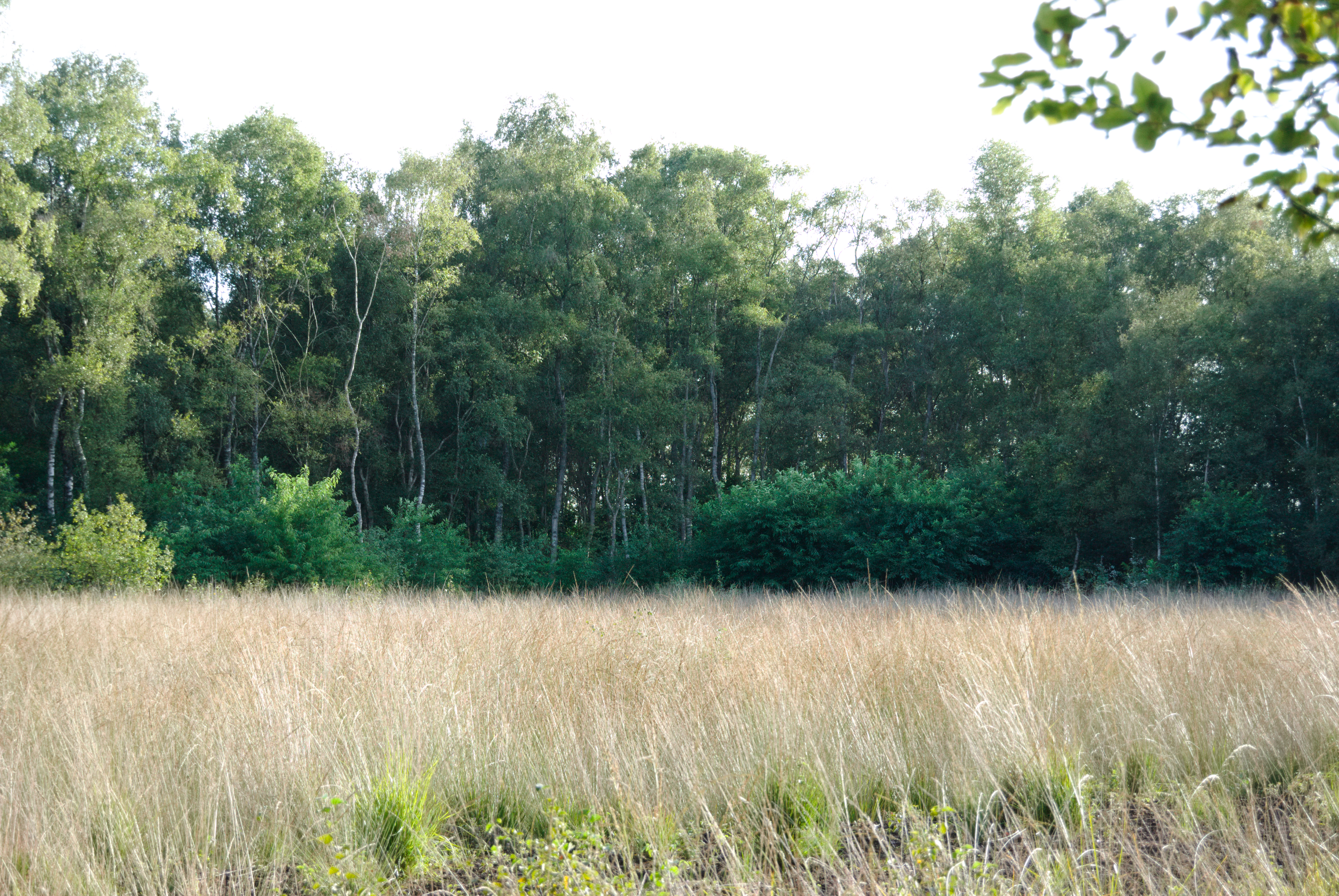 Pfeifengras in Hootmanns Meer